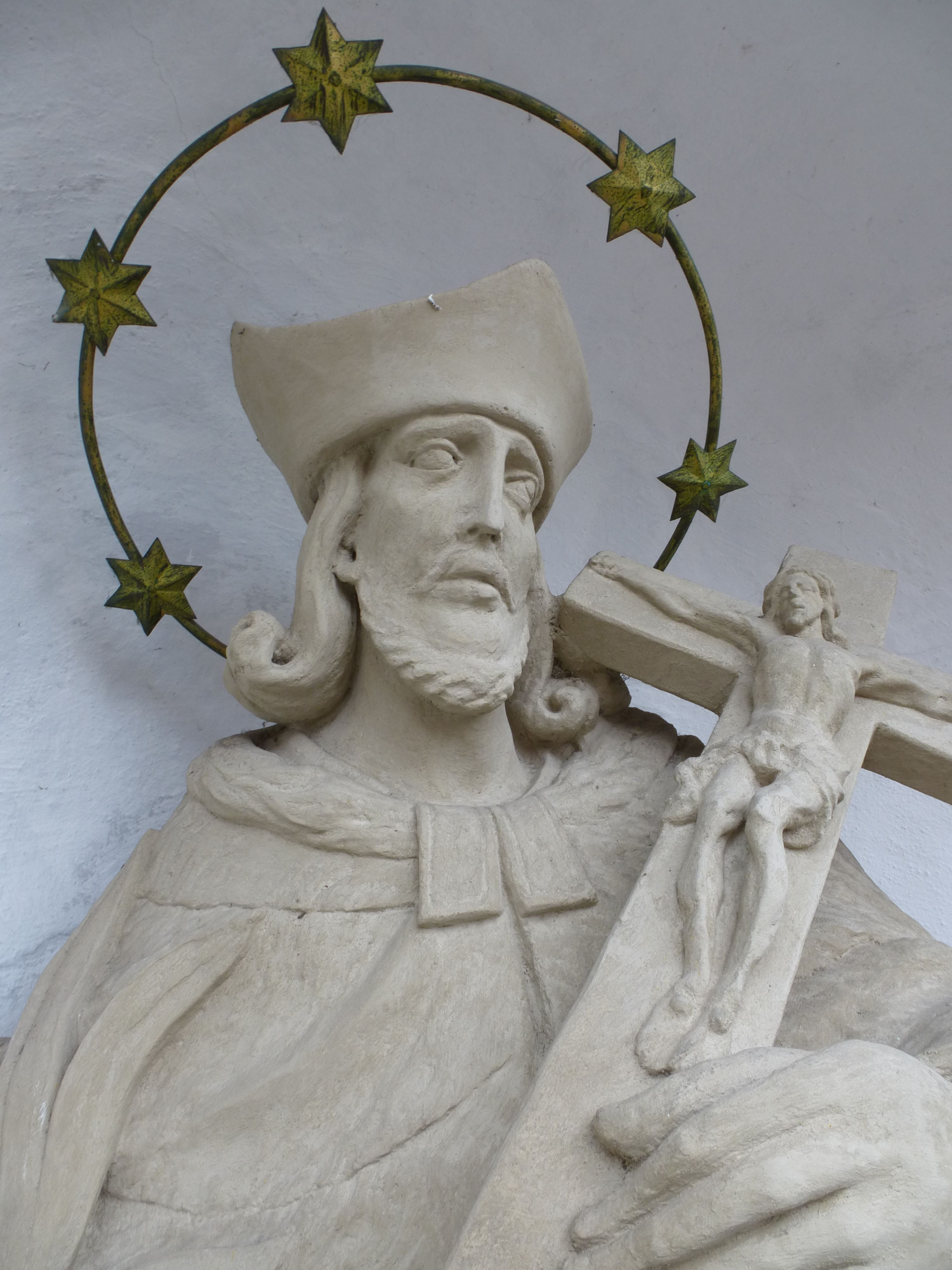 Detail der Statue des Hl. Johannes Nepomuk, Perchtoldsdorf, Hochstraße 135